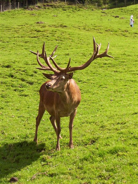 Cervo (non conosco la sottospecie) fotografato in Austria.